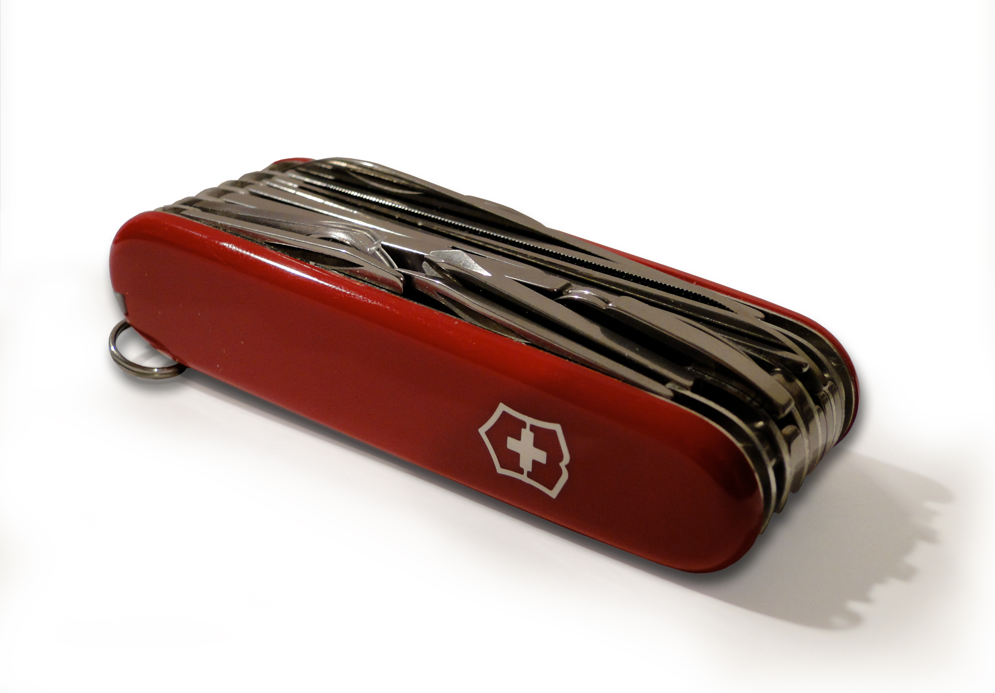 Ein Victorinox Swisschamp in geschlossenem Zustand